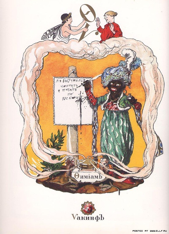 Азбука в картинках Александра Бенуа. [Санкт-Петербург], Экспедиция заготовления Государственных бумаг, 1904.